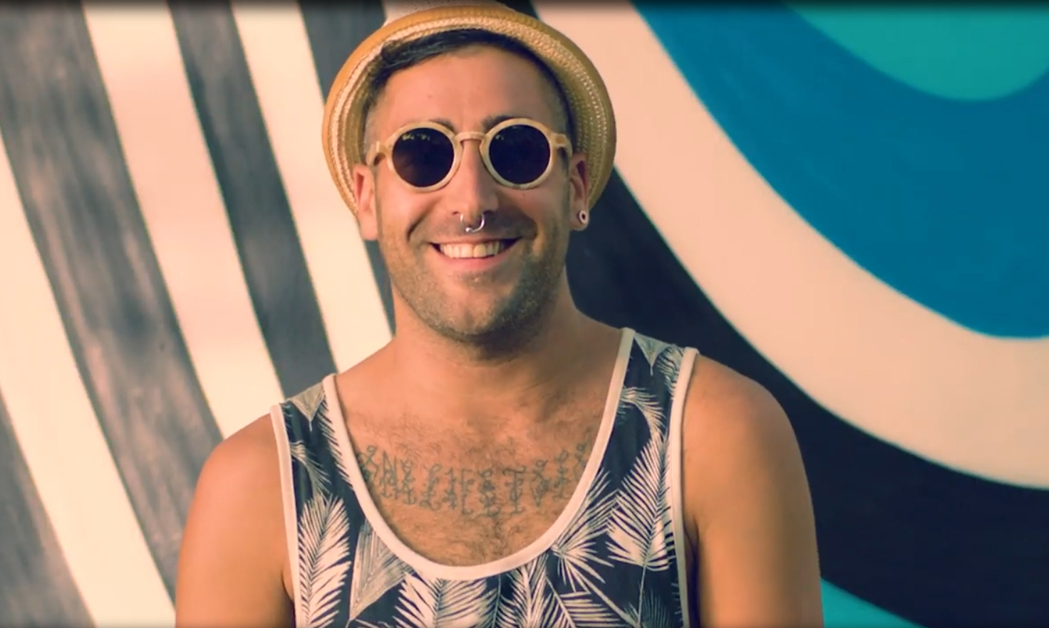 Okuda San Miguel.